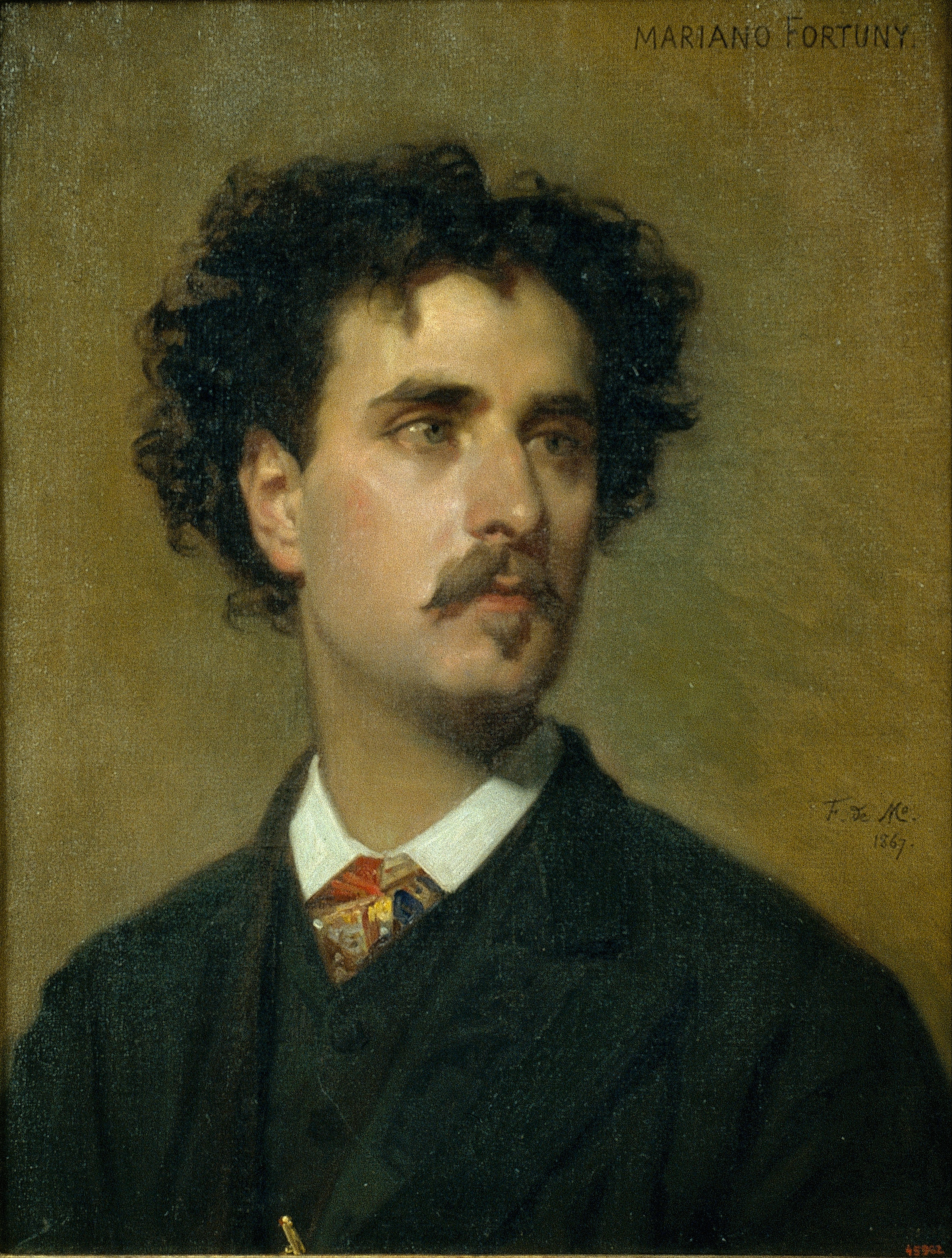 Retrato del pintor español Mariano Fortuny (1838-1874).